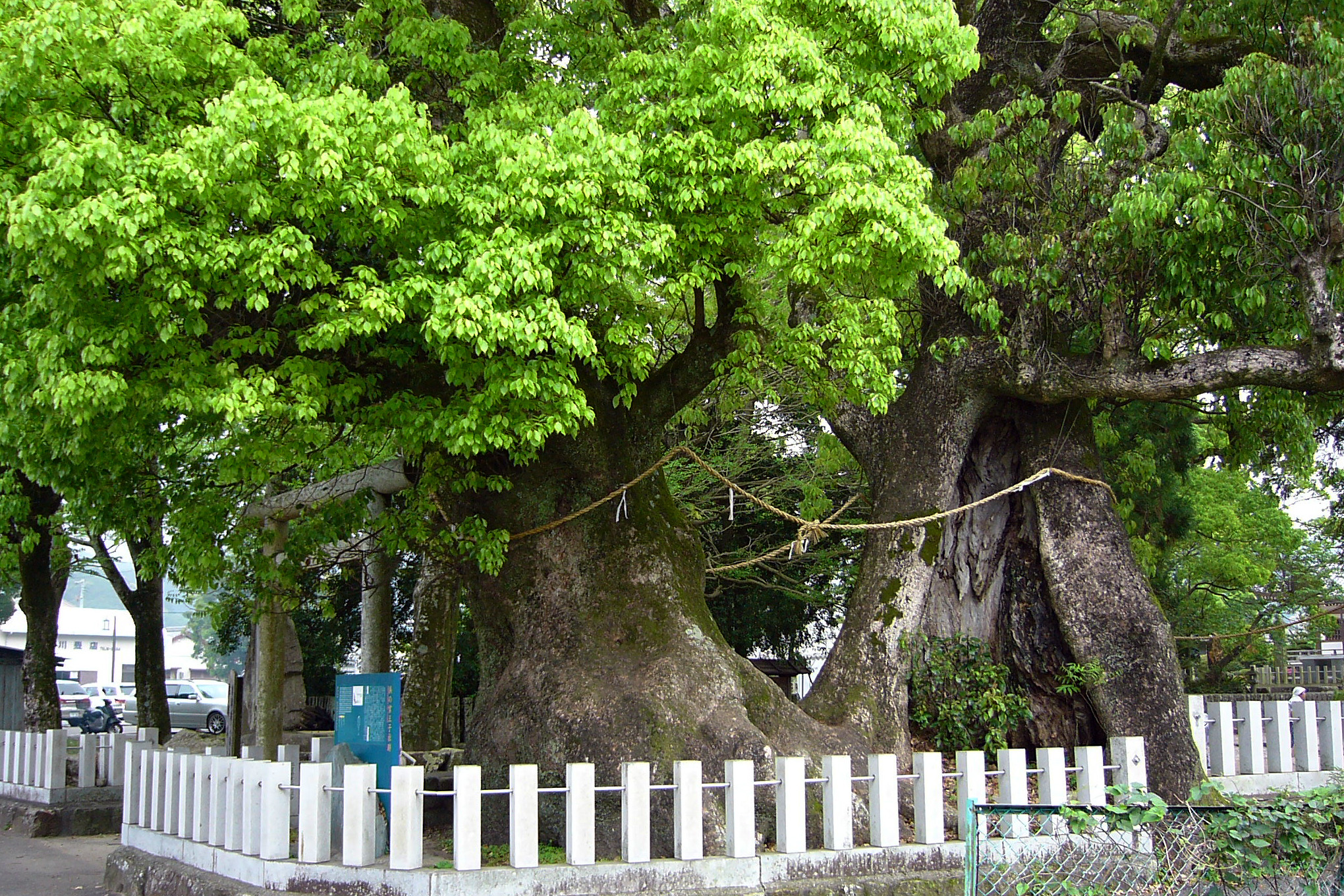 Kumanosanshooomiwasha in Nachikatsuura, Wakayama prefecture